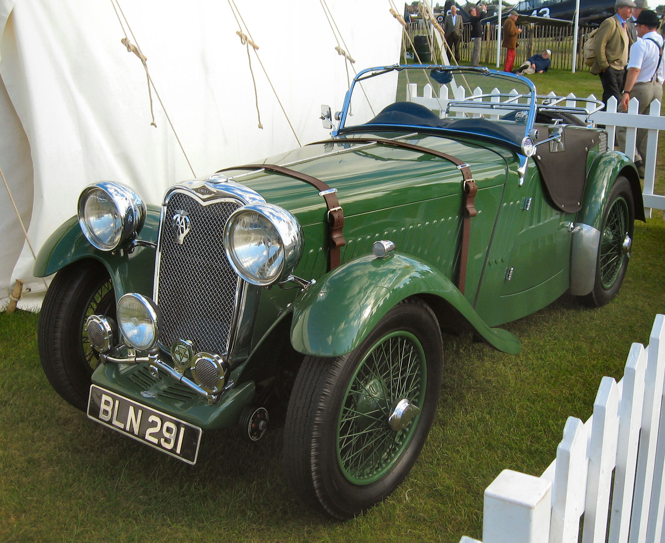 Singer 1½-Litre Le Mans Beautiful Singer tourer.